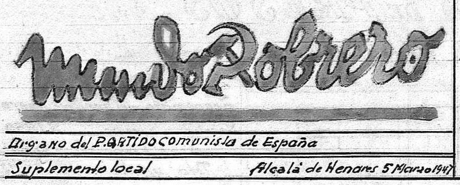 Cabecera del periódico "Mundo Obrero" publicado clandestinamente en los talleres penitenciarios de Alcalá de Henares (Comunidad de Madrid - España) entre 1945 y 1947.